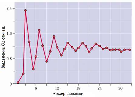 Выделение кислорода хлоропластами в ответ на серию кратковременных вспышек